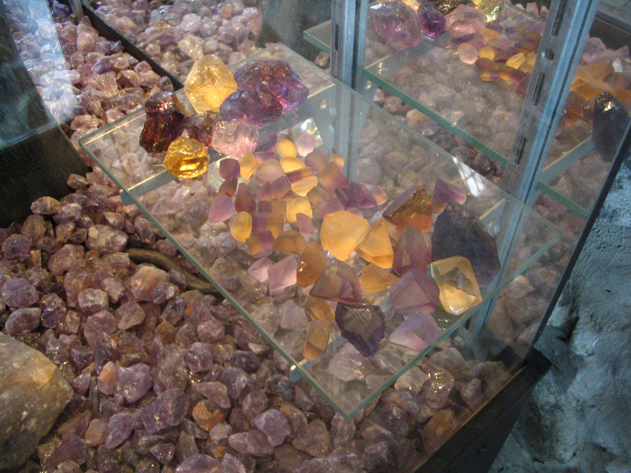 fr: Ametrine aussi appelée Bolivianite. Photo prise dans la casa de la moneda à Potosí en Bolivie. Author : User:Anakin